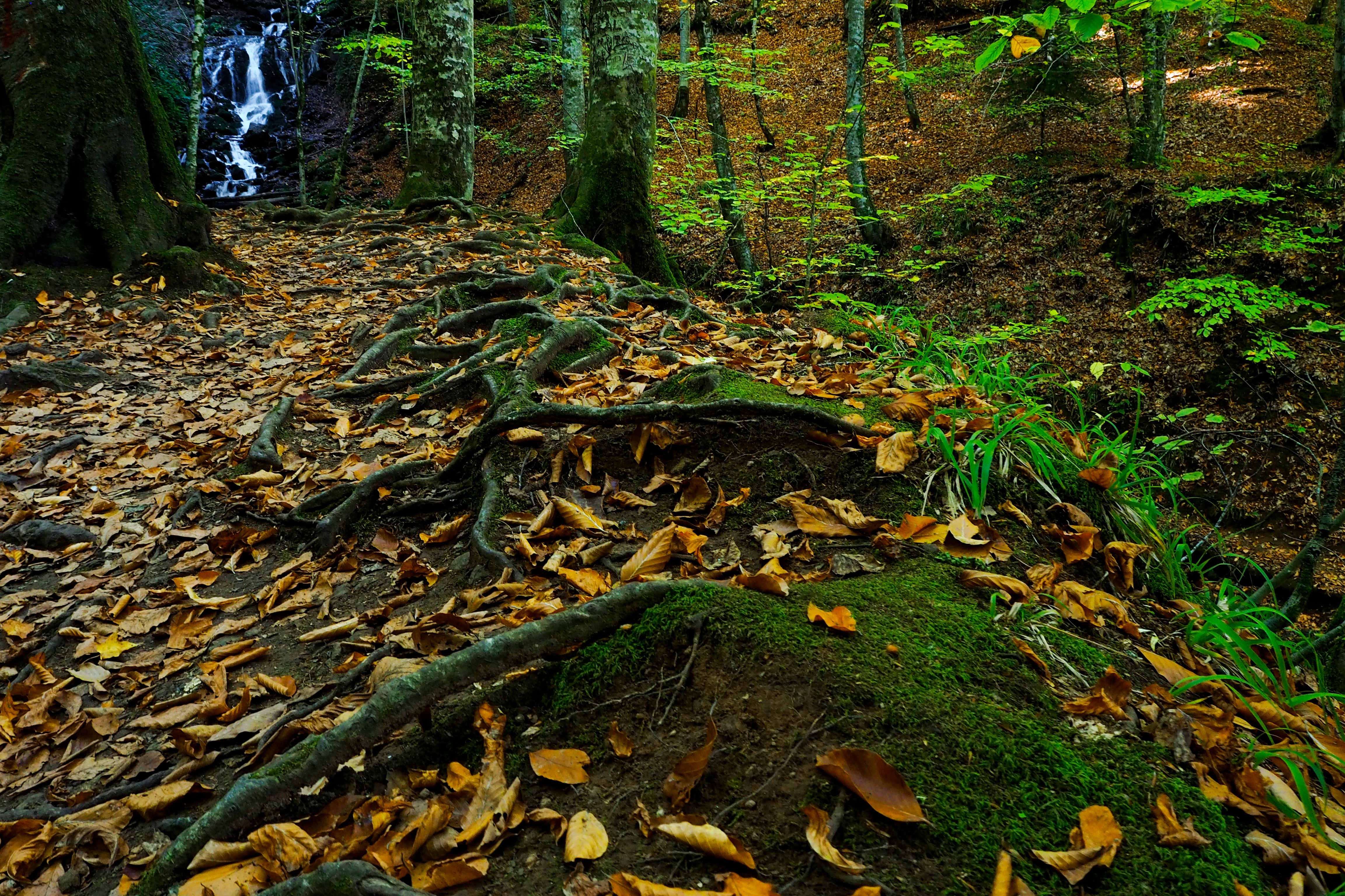 Milli parktaki ağaç kökleri